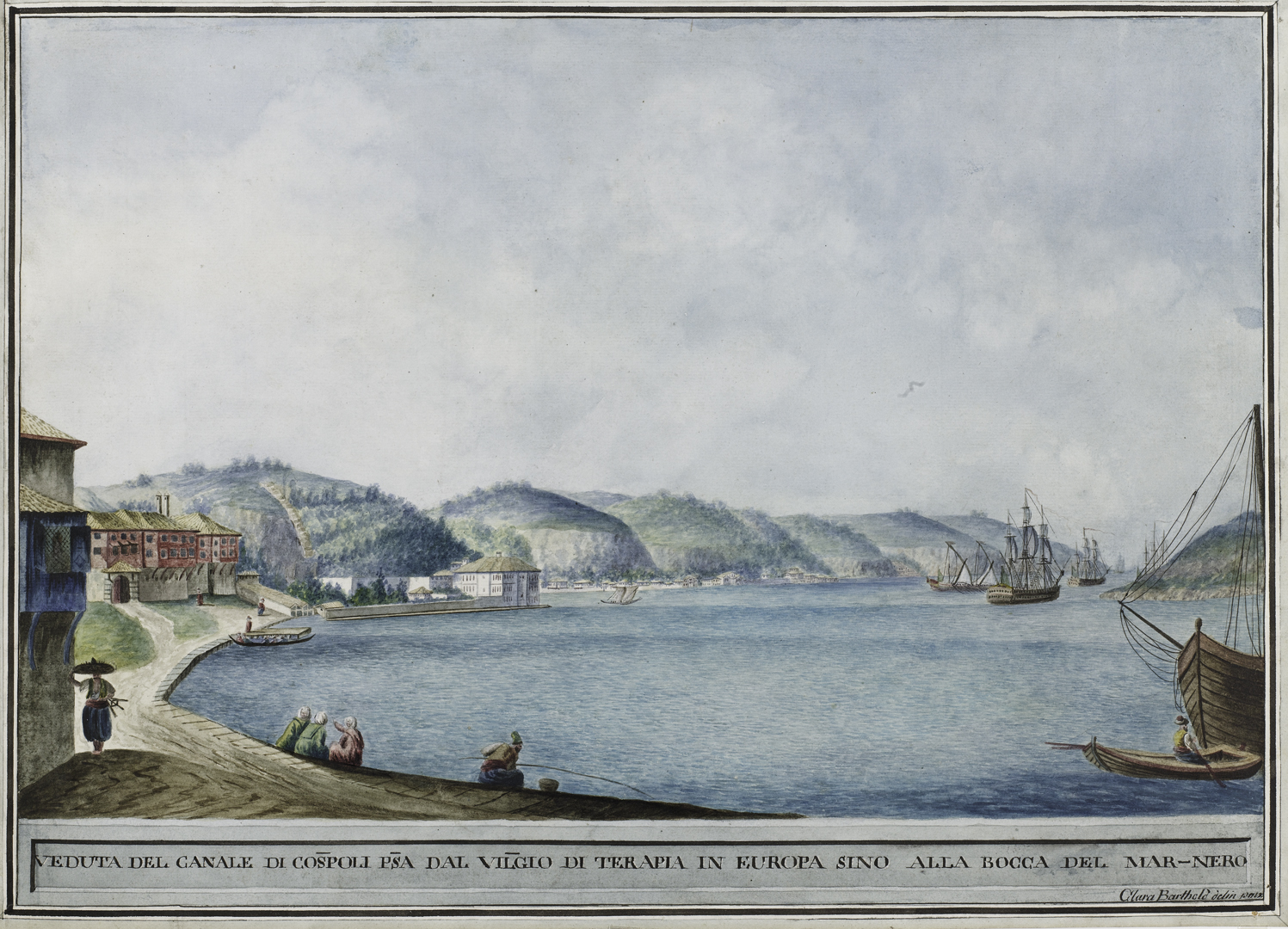 Istanbul Boğazı’nın Tarabya’dan Karadeniz girişine kadar görünümü, Clara Barthold Mayer, 46,5 x 68 cm,18. yüzyıl sonları